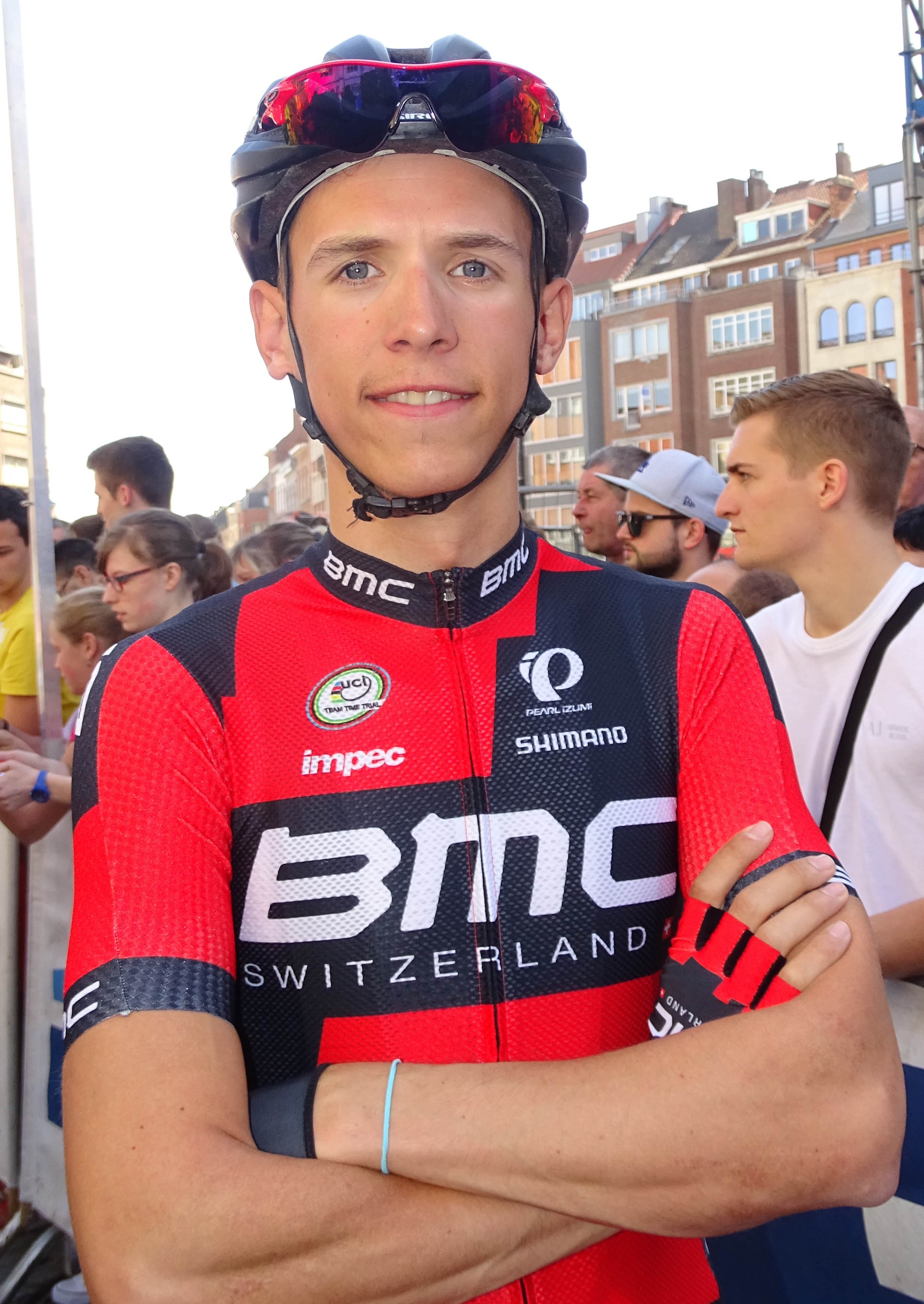 Reportage réalisé le mercredi 15 avril à l'occasion du départ de la Flèche brabançonne 2015 à Louvain, Belgique.